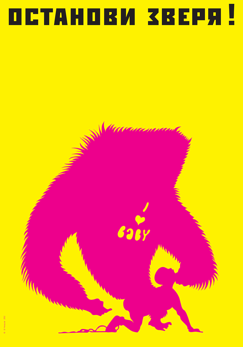 ОСТАНОВИ ЗВЕРЯ! Комп. графика, 70х100 см. 2012 г